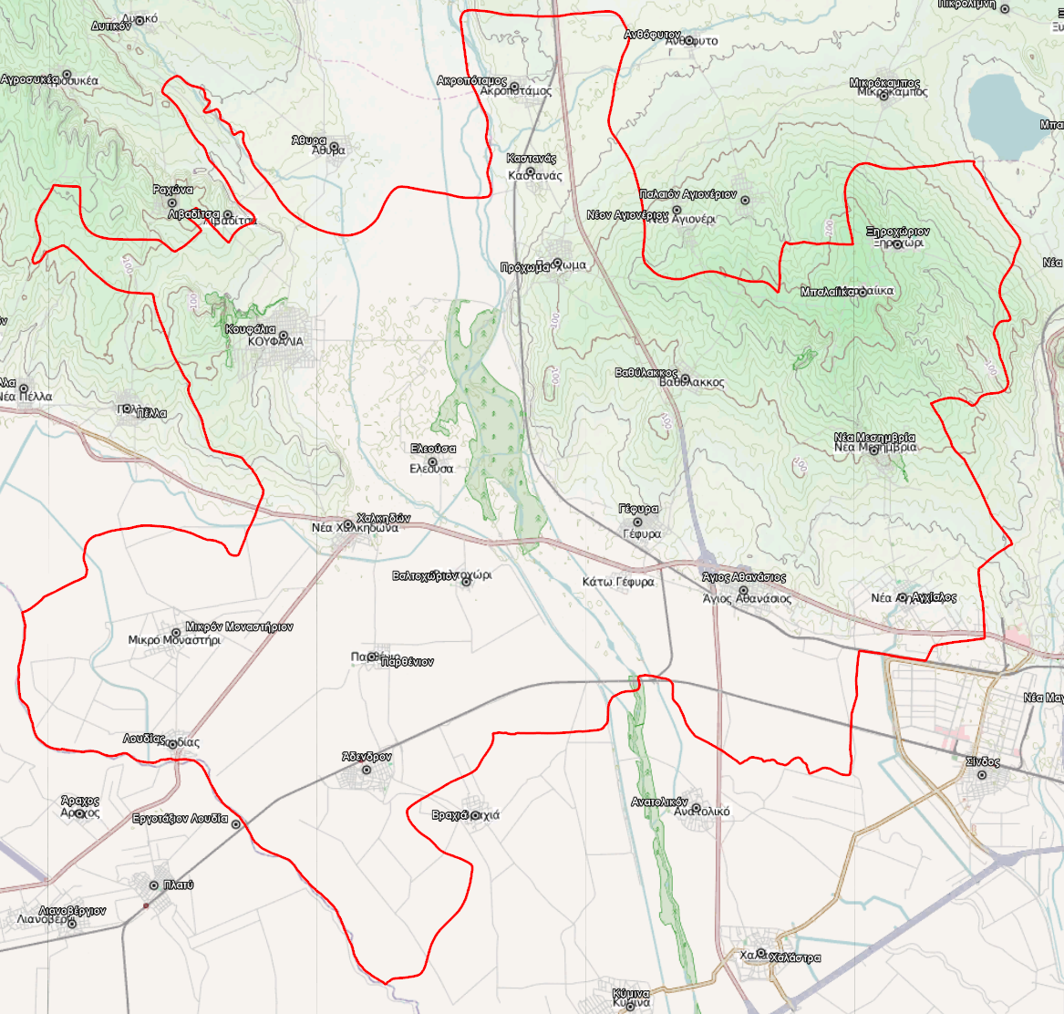 Τοπογραφικός χάρτης του Δήμου Χαλκιδόνος